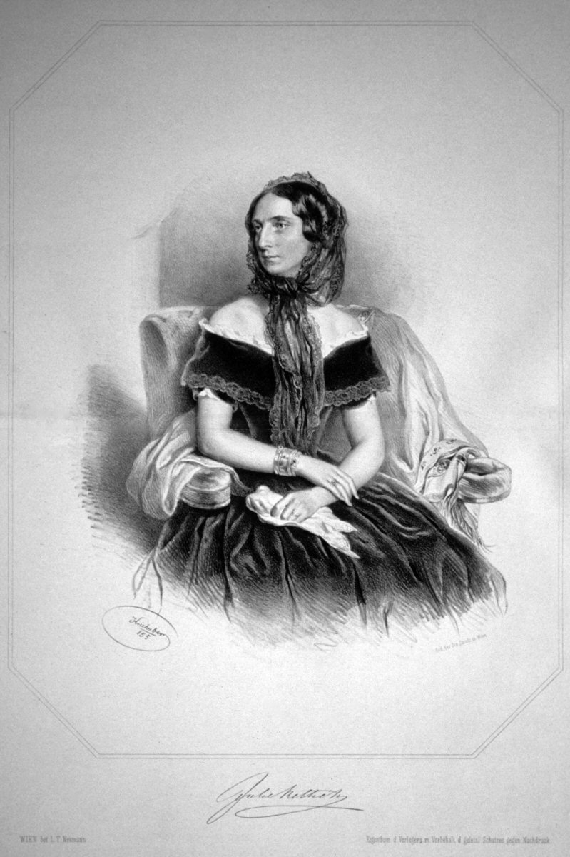 Julie Rettich, Lithographie von Josef Kriehuber, 1855